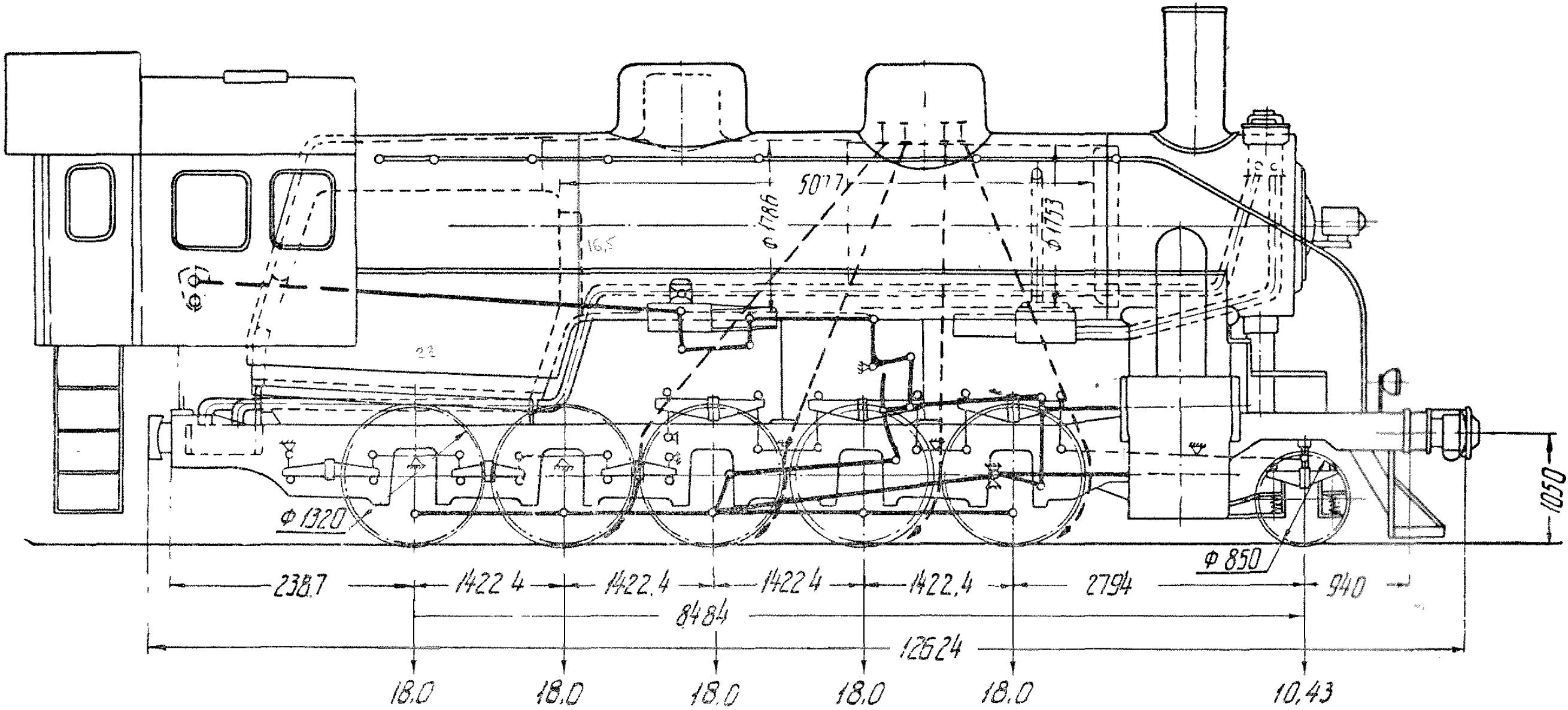 Основные размеры паровоза Еа